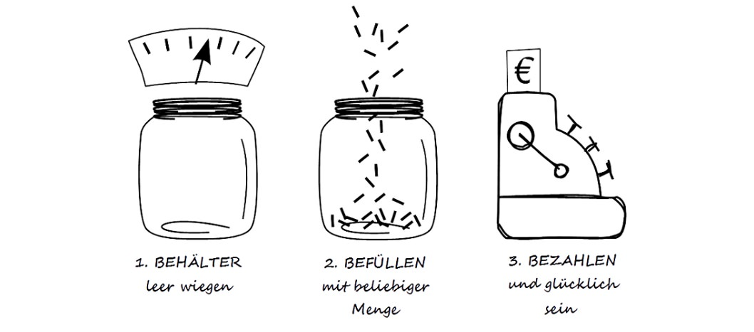 Skizze, die den Abfüllprozess eines Unverpackt-Ladens darstellt.